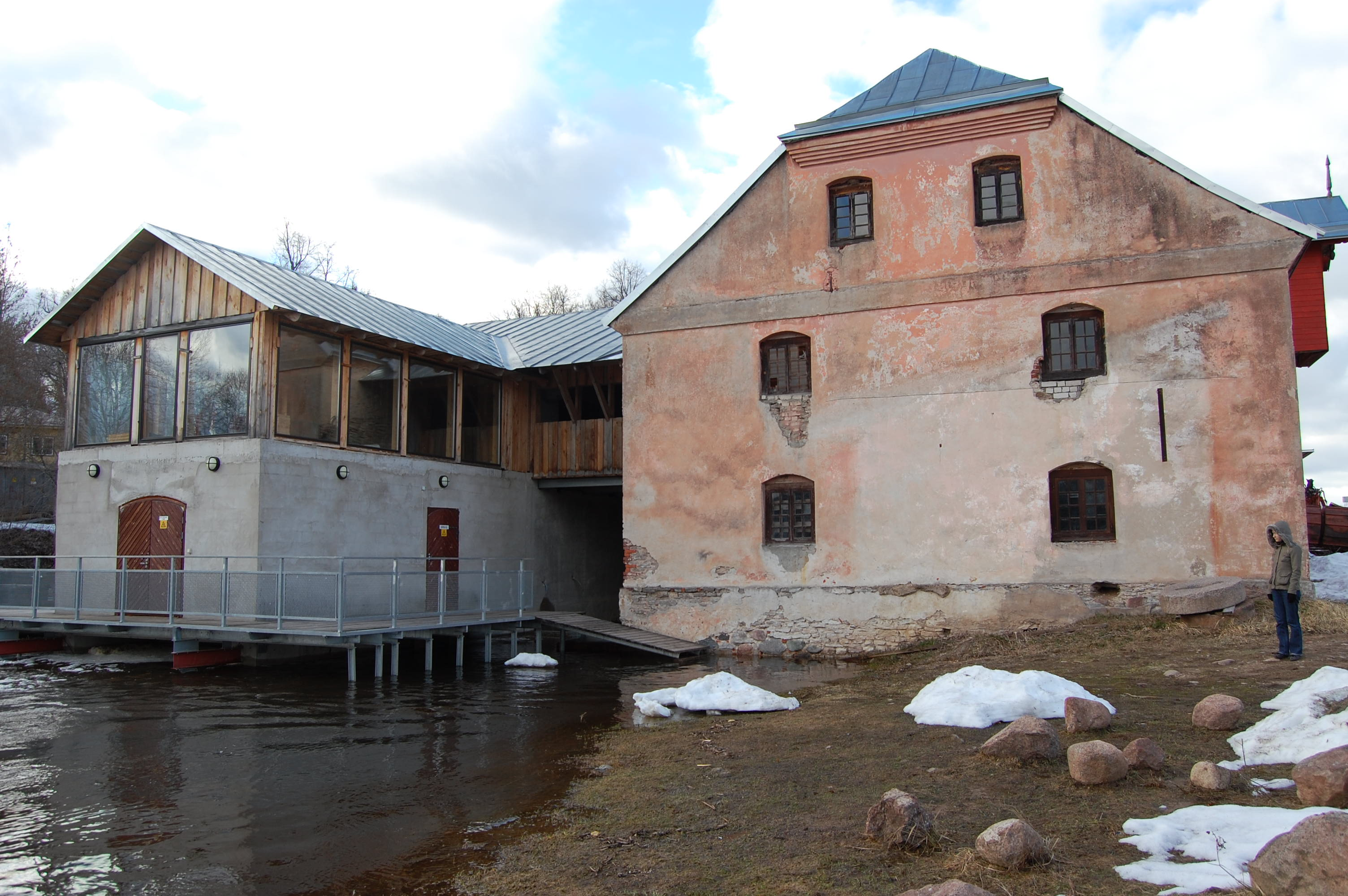 Räpina mõisa vesiveski